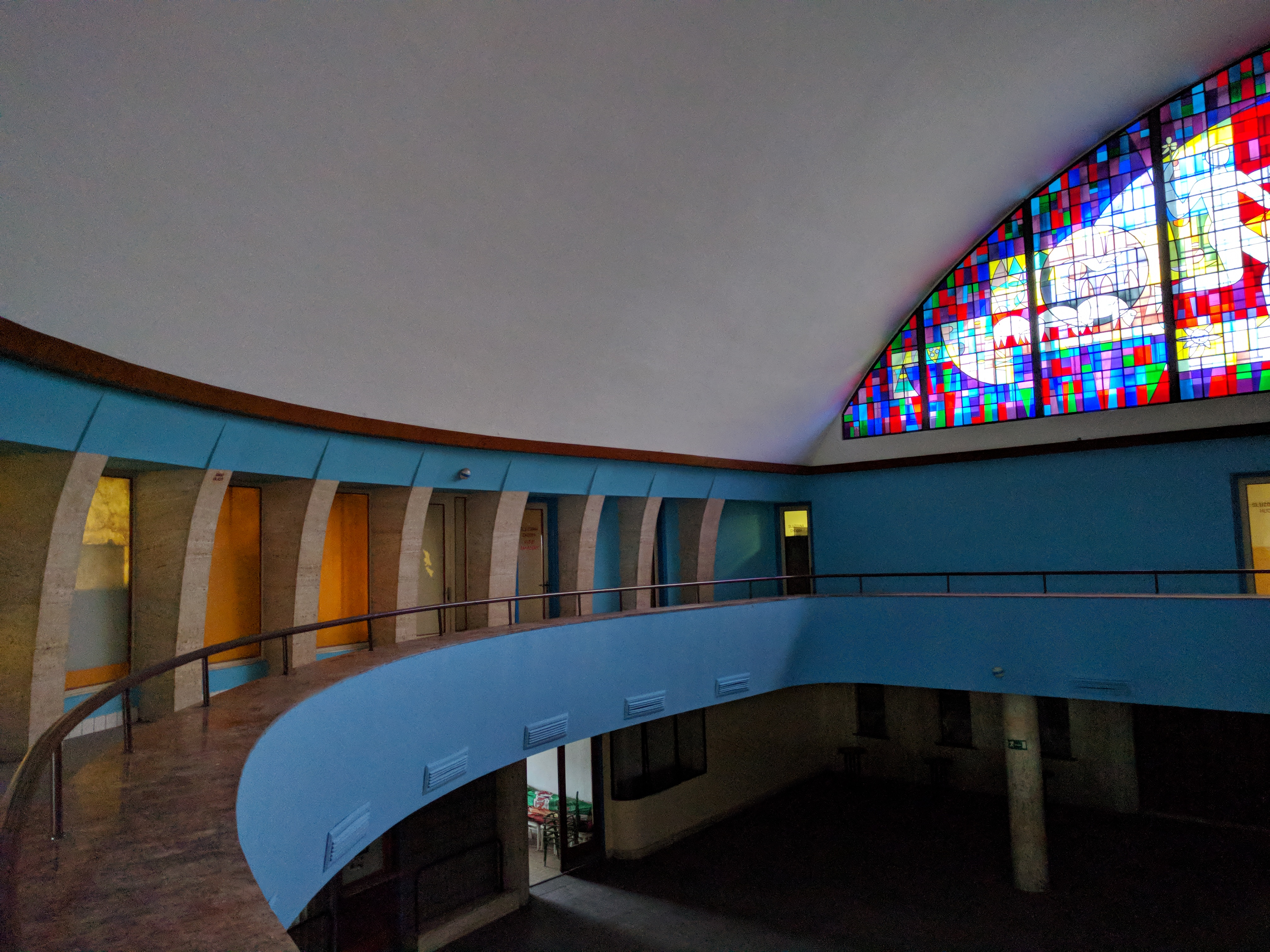 The interior of the railway station of Svit